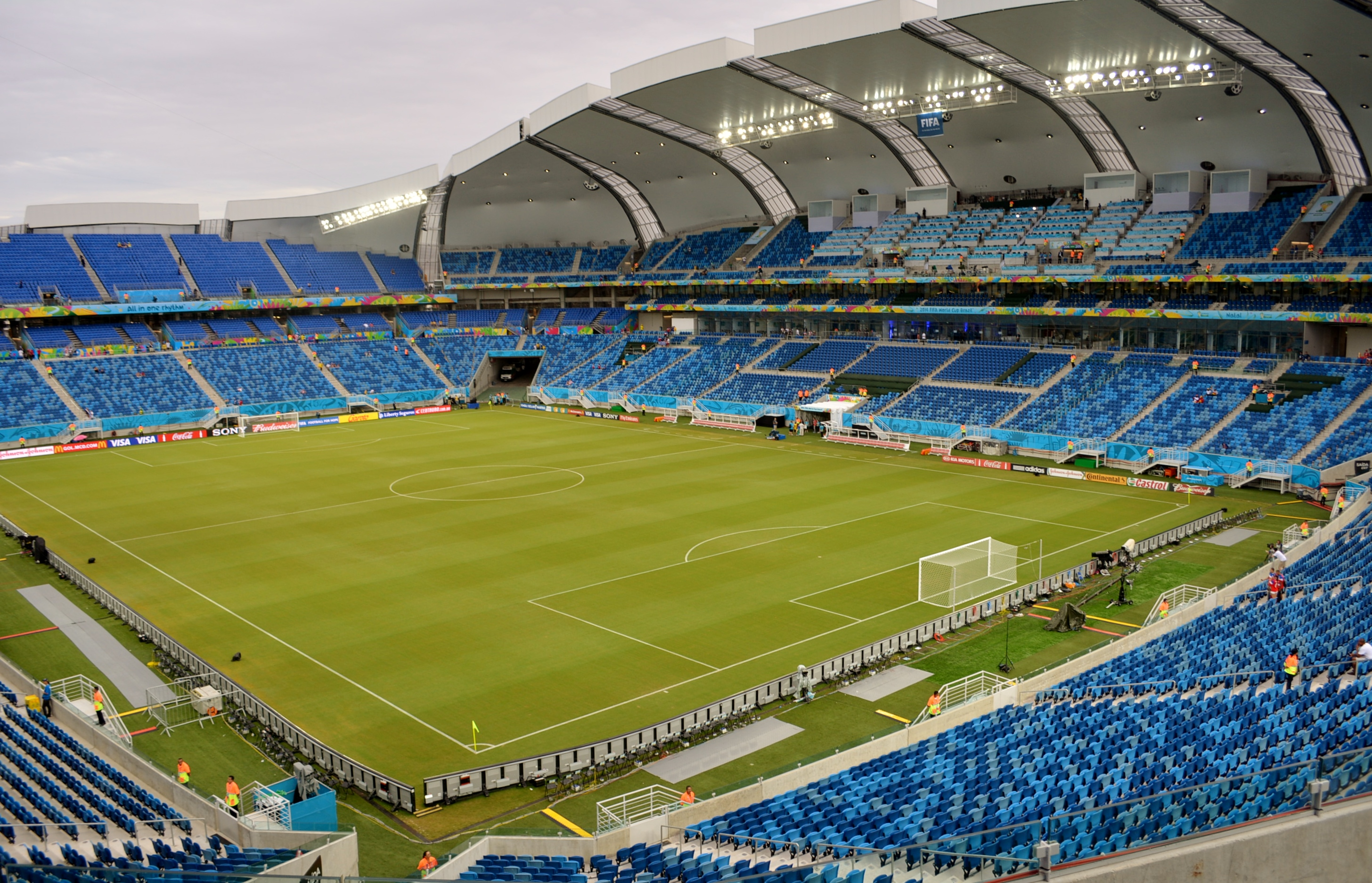 Arena das Dunas (indoors)